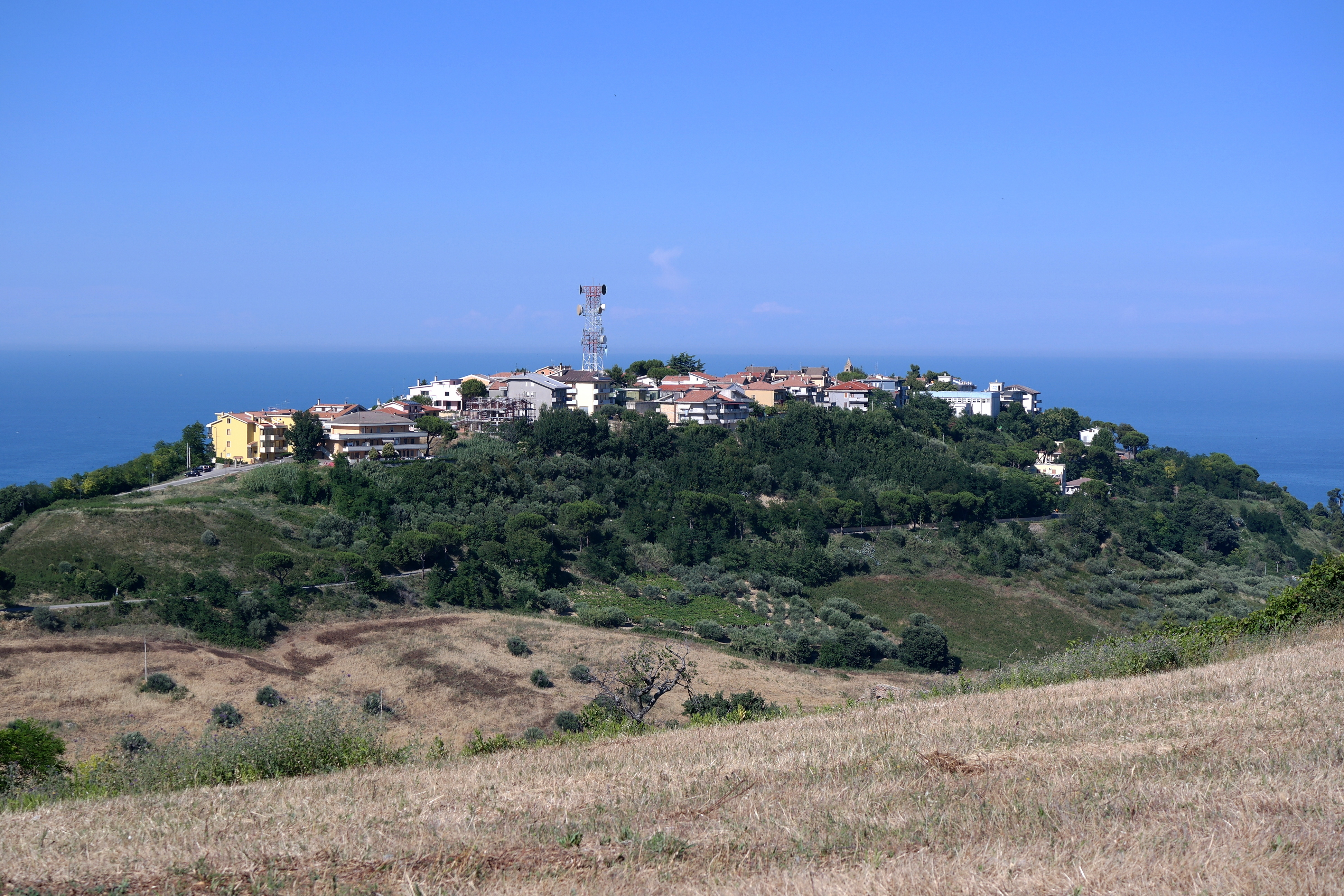 Veduta di Silvi paese